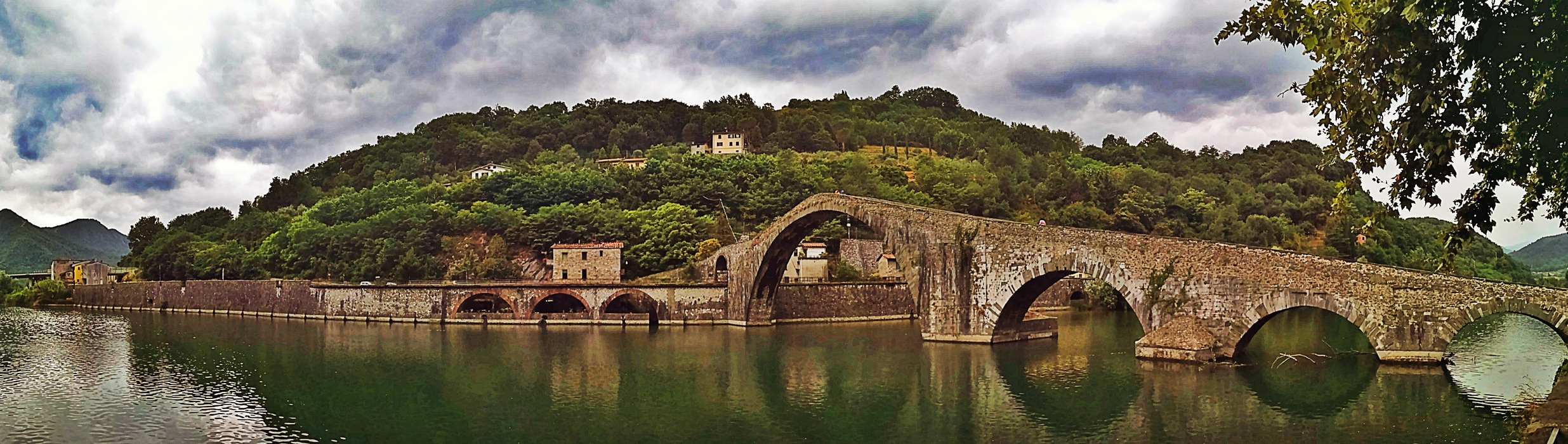 Ponte del Diavolo, azaz az Ördög Hídja